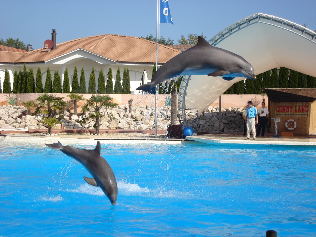 Open-Air-Delfinlagune im Connyland